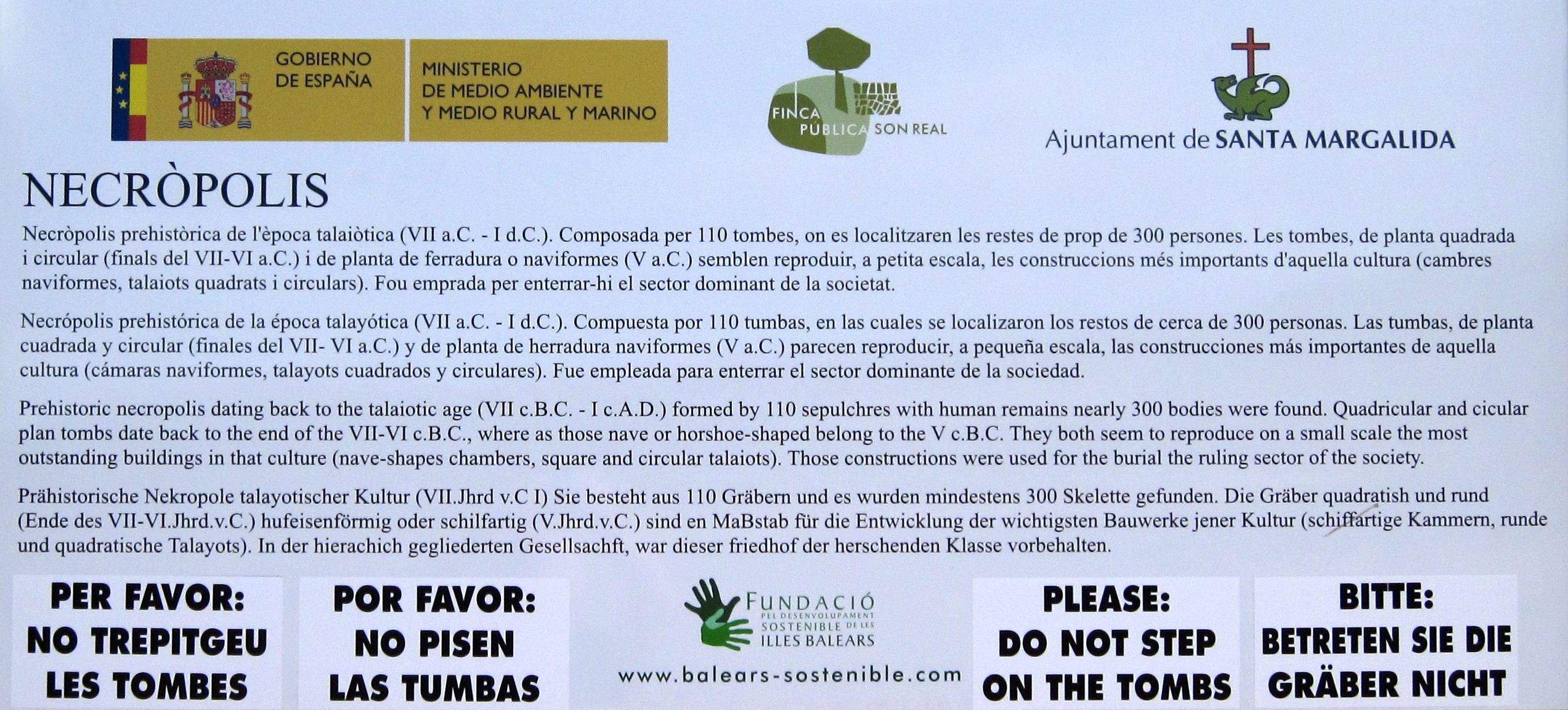 Hinweisschild vor der Nekropole von Son Real, Gemeinde Santa Margalida, Mallorca, Spanien